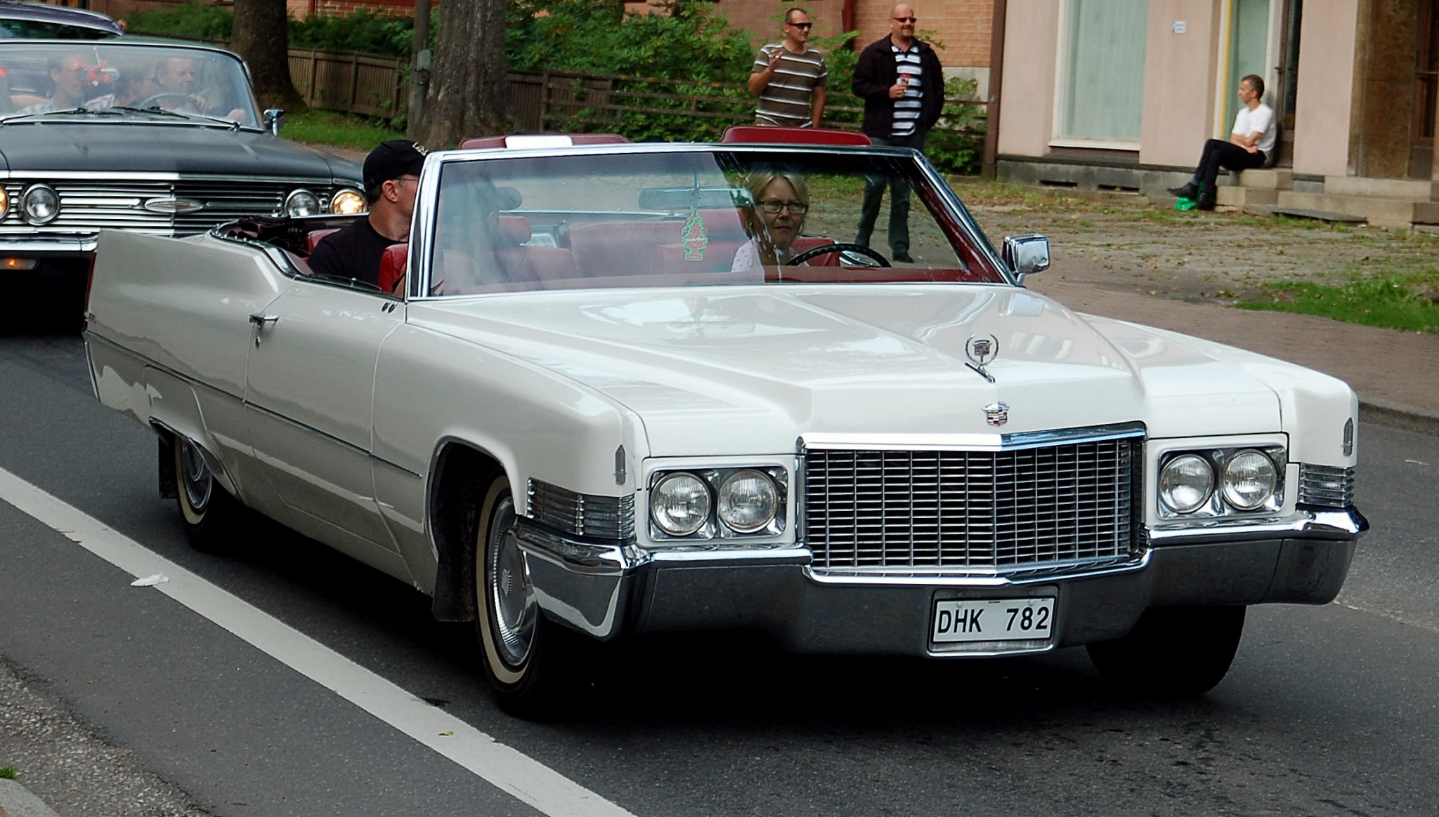 CADILLAC DE VILLE CONV Färg: VIT Fordonsår: 1970 Chassinummer: FO275690 Tekniska data Kaross: Öppet Tjänstevikt, kg: 2310 Totalvikt, kg: 2780 Max lastvikt, kg: 470 Längd, mm: 5850 Bredd, mm: 2030 Drivmedel BENSIN Motoreffekt, kw: 347,0 Fotot är taget på Sankt Olofsgatan i Falköping. I bakgrunden skymtar fasaden till S:t Olofsgatan 12.